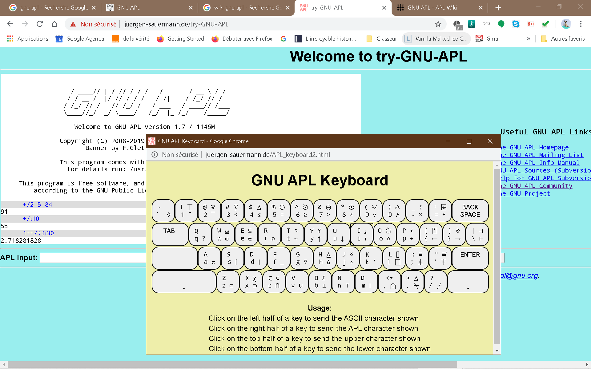 La fenêtre bleue contient la session d'essai, la jaune le clavier permettant de taper les tous les caractères APL non disponibles au clavier (et quelques autres aussi)